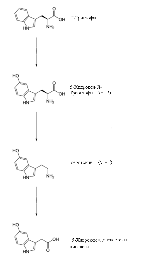 Cинтез на Серотонин от Триптофан